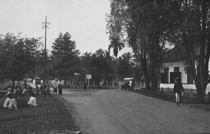 Foto. Straatgezicht, Moearaenim